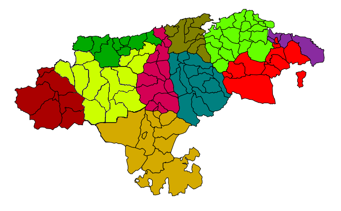 Las comarcas administrativas de Cantabria (España).